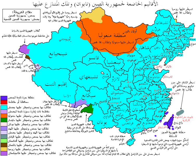 خارطة لجمهورية الصين تظهر فيها التقسيمات الإدارية التي تُطالب بها هذه الجمهورية والتي تسيطر عليها دولاً أخرى.